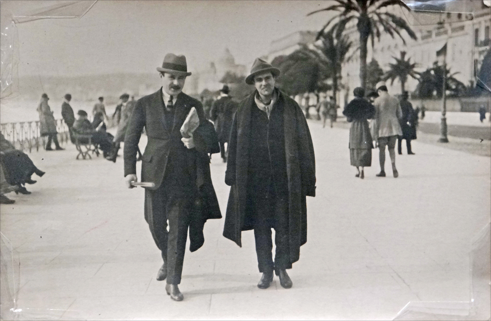 Paul Guillaume et Amedeo Modigliani à Nice 1917 Photographie (auteur inconnu) Musée de l'Orangerie